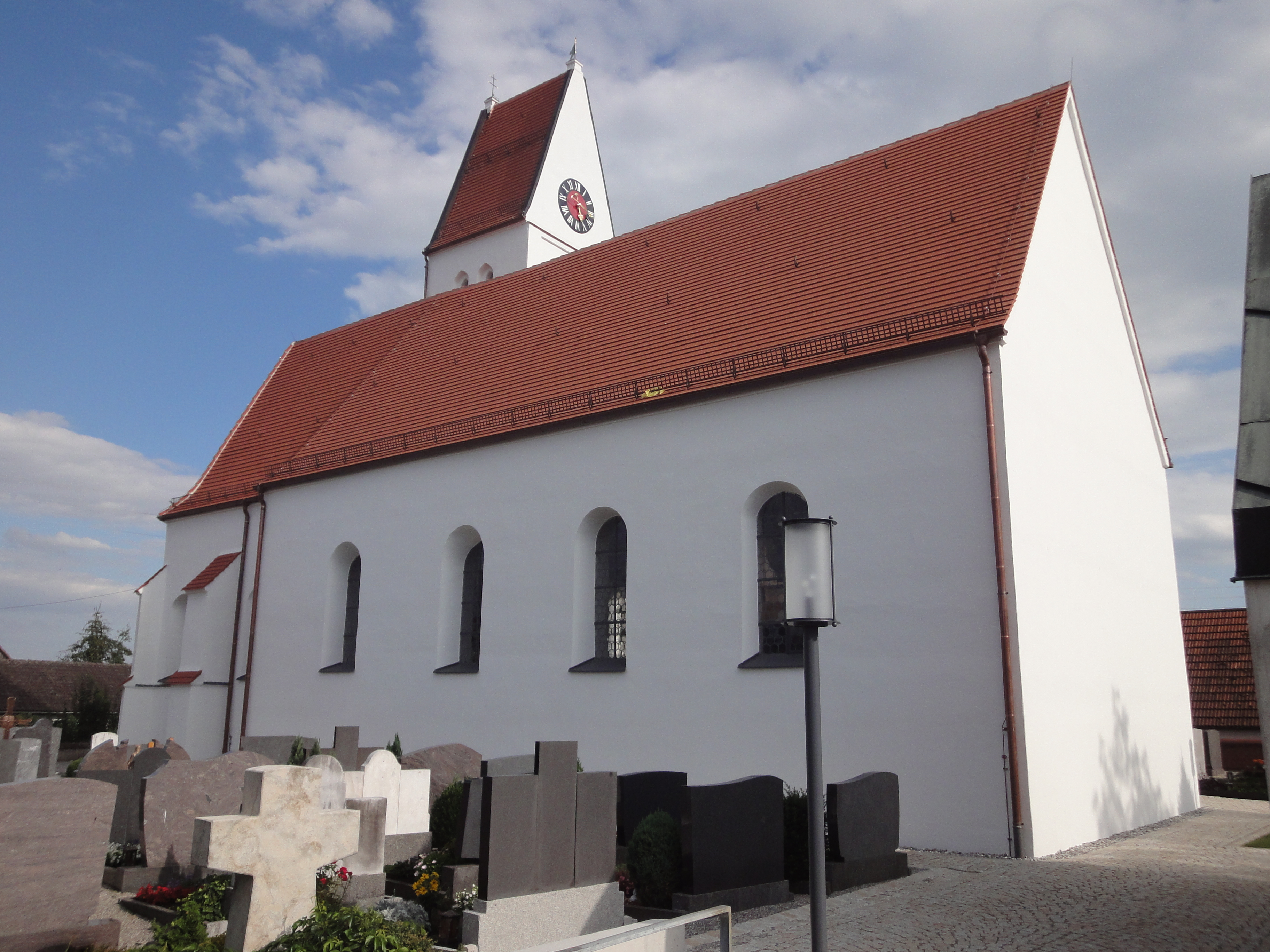 Saalbau mit eingezogenem Chor und südlichem Satteldachturm, Langhaus im Kern romanisch, Turm und Chor Mitte 15. Jahrhundert